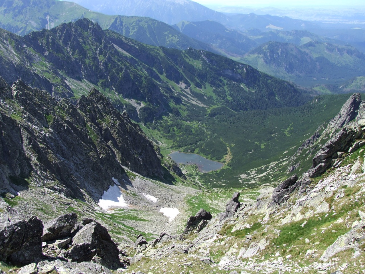 Dolina Kołowa (Tatry Wysokie). Widok z grani Jagnięcego Szczytu